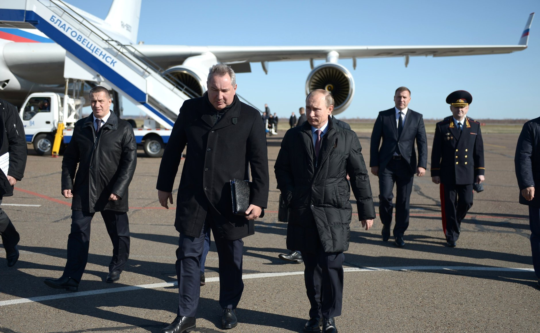 Президент России Владимир Путин на космодроме Восточный